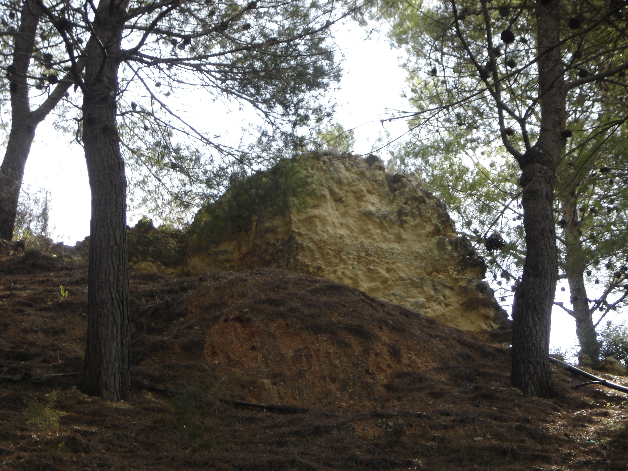 Mur del desparegut Castell de Puigdelfí al municpi dels Pallaresos.